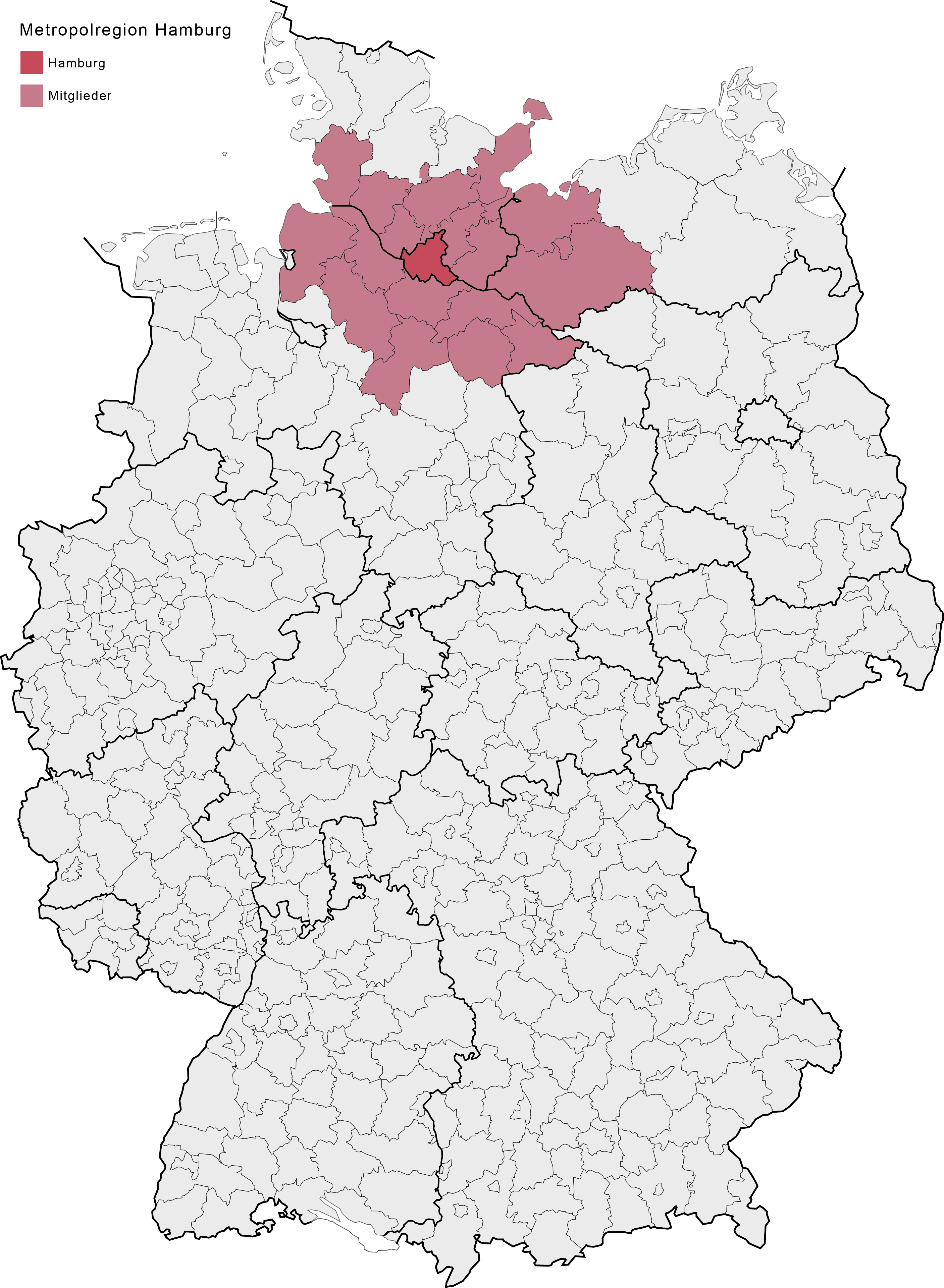 Aktualisierung der vorherigen Karte file:Metropolregion Hamburg 2012.png auf den Stand seit Januar 2017 (plus Altkreis Parchim und Stadt Schwerin)